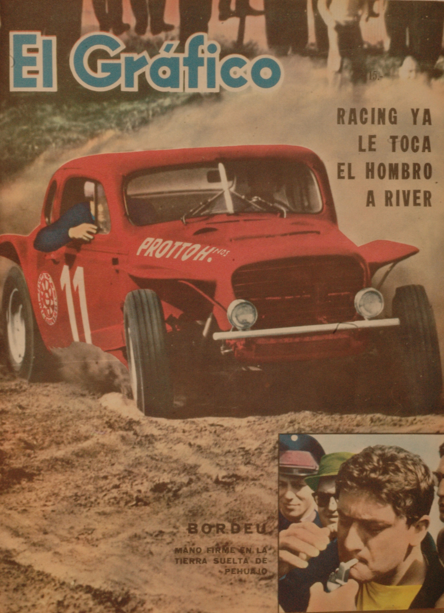 El Grafico del 18 de Septiembre de 1963. Edicion 2293